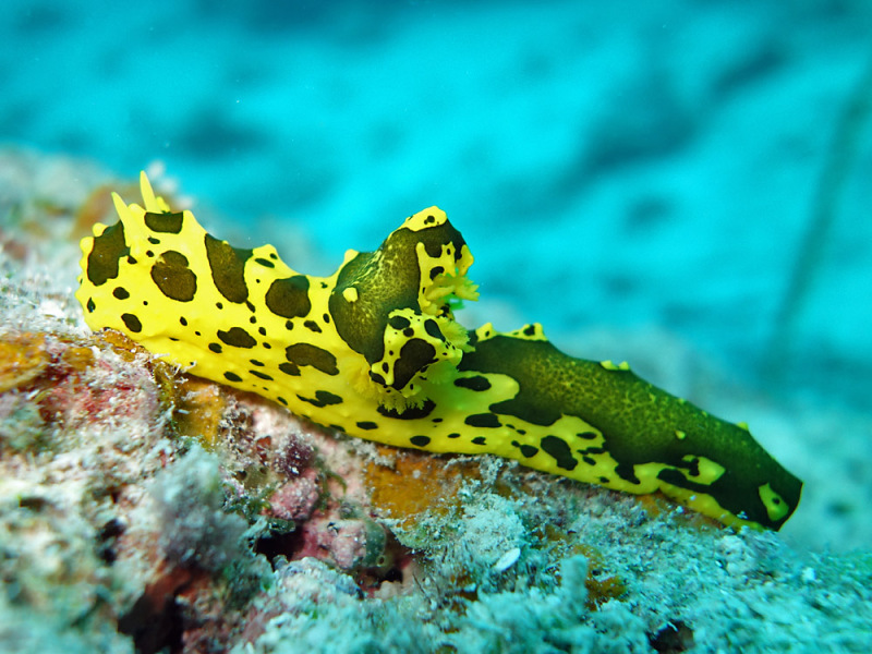 Notodoris gardineri, isla Lizard, Australia